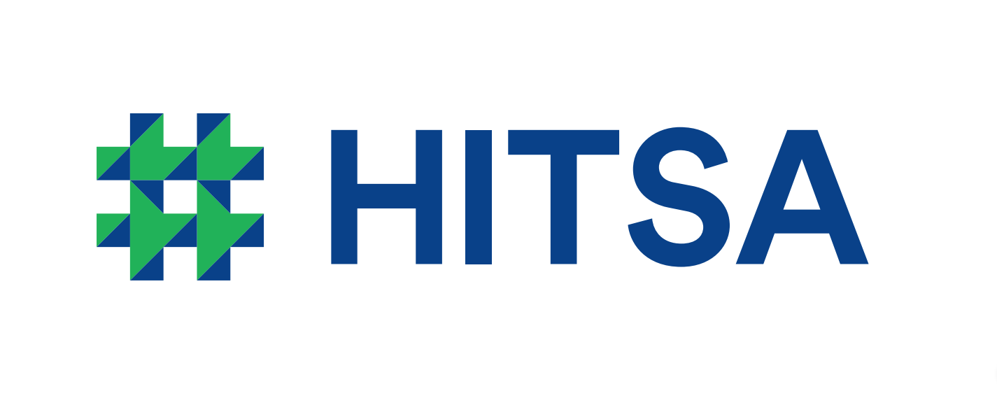 HITSA logo